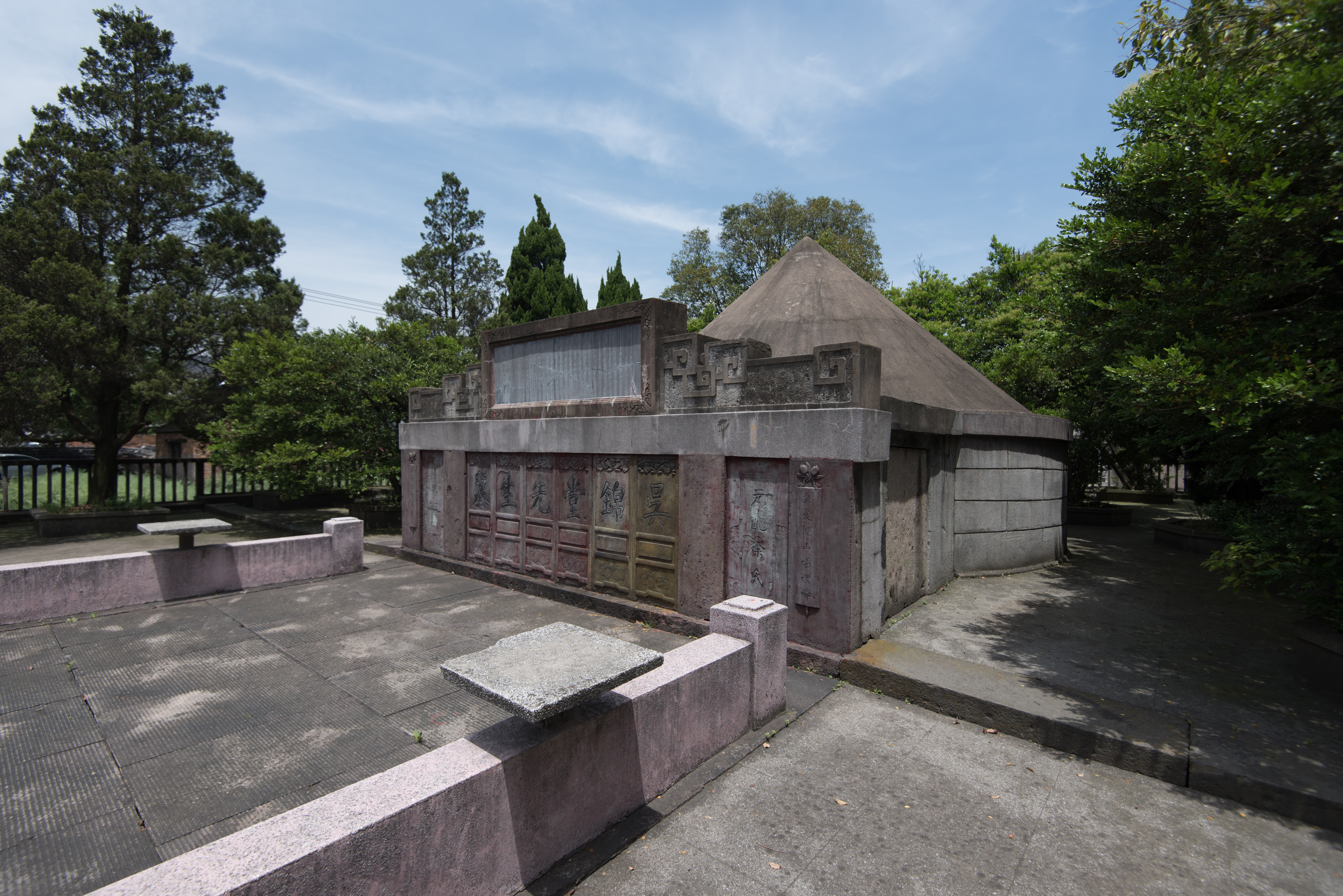 慈溪吴锦堂墓